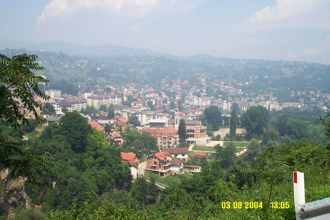 Pohled na město Jajce